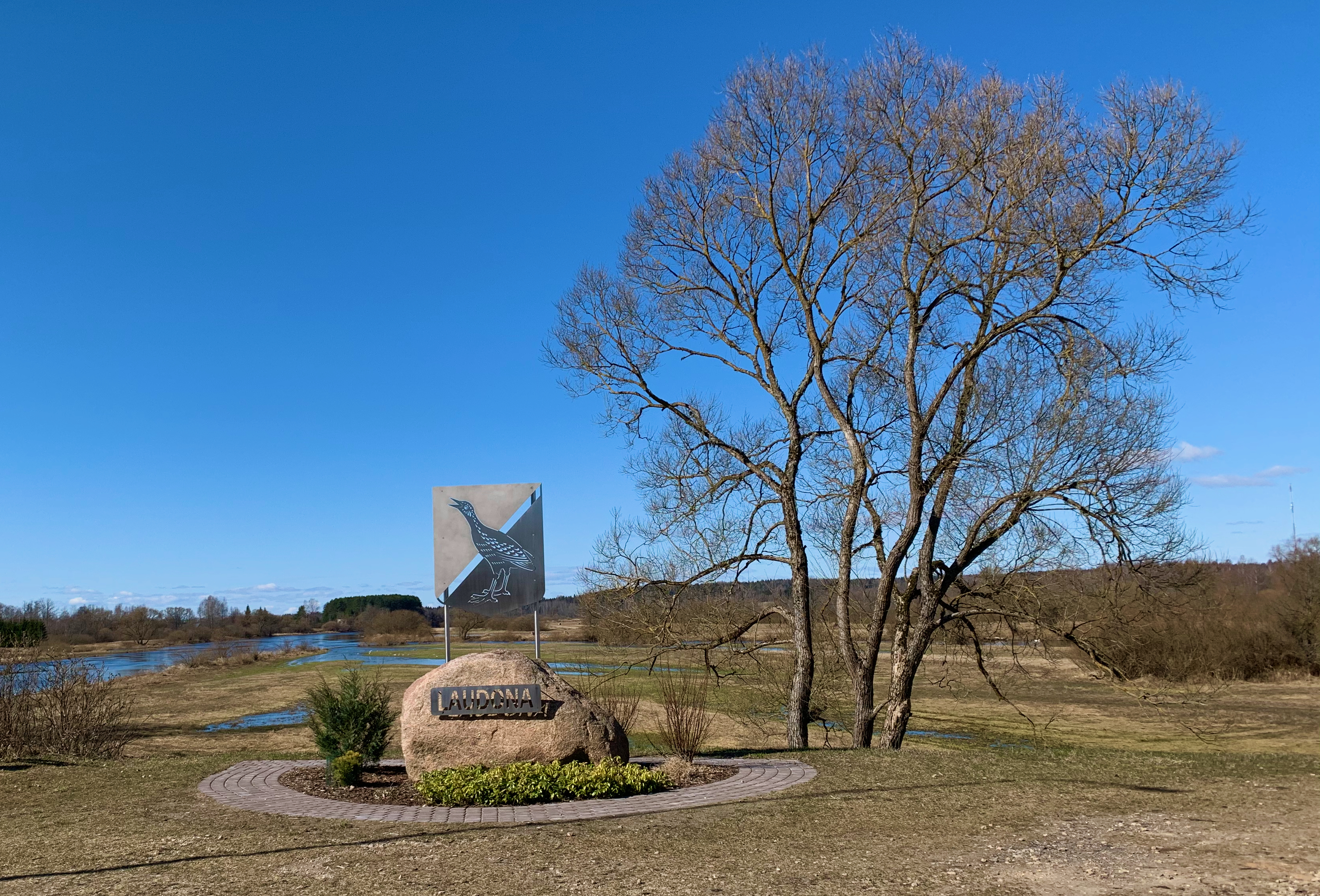 Atrodas pie tilta pār Aivieksti, Ļaudonā